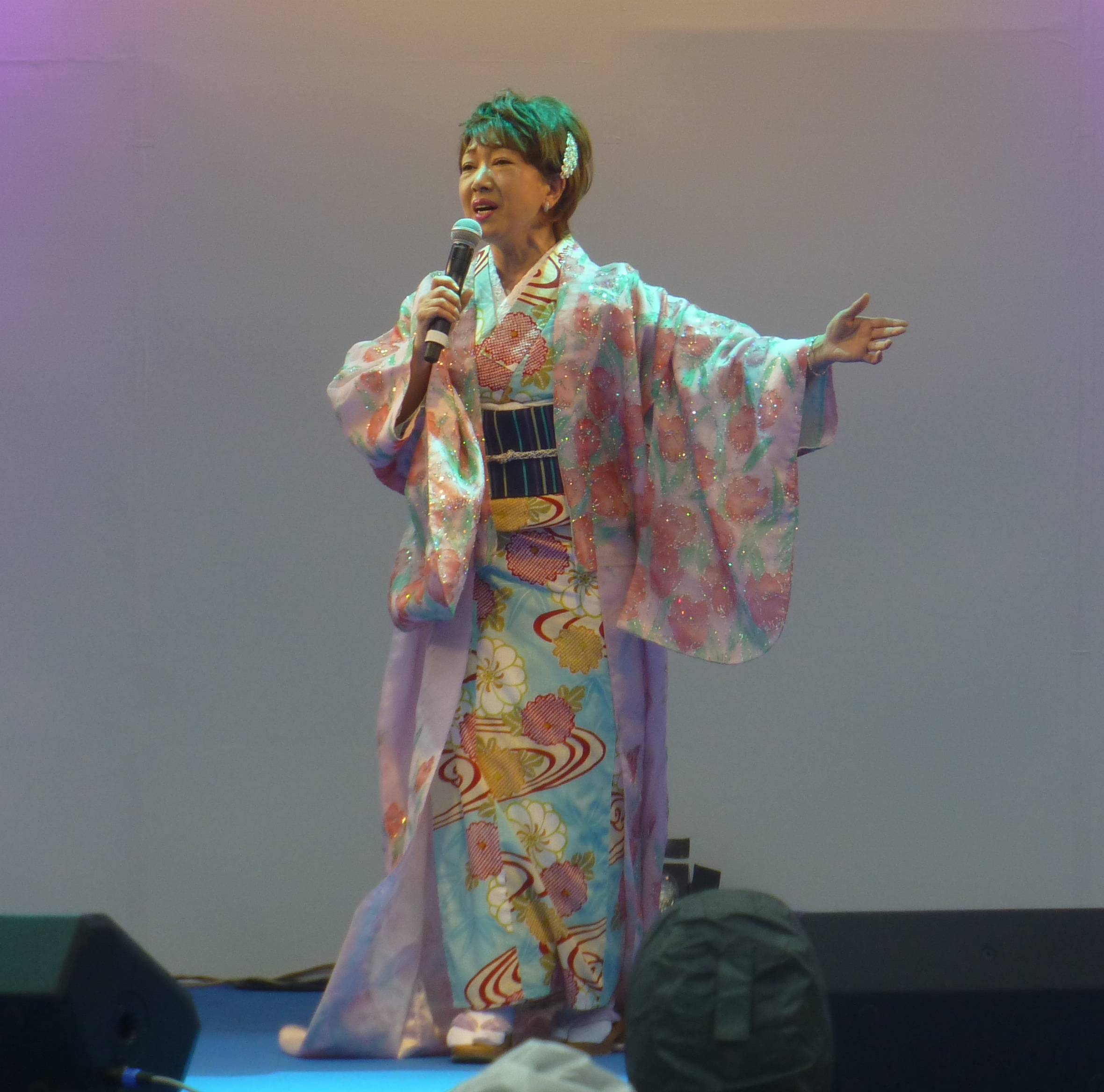 順 弘子（じゅん ひろこ、Hiroko Jun）は、日本の歌手。新橋にて